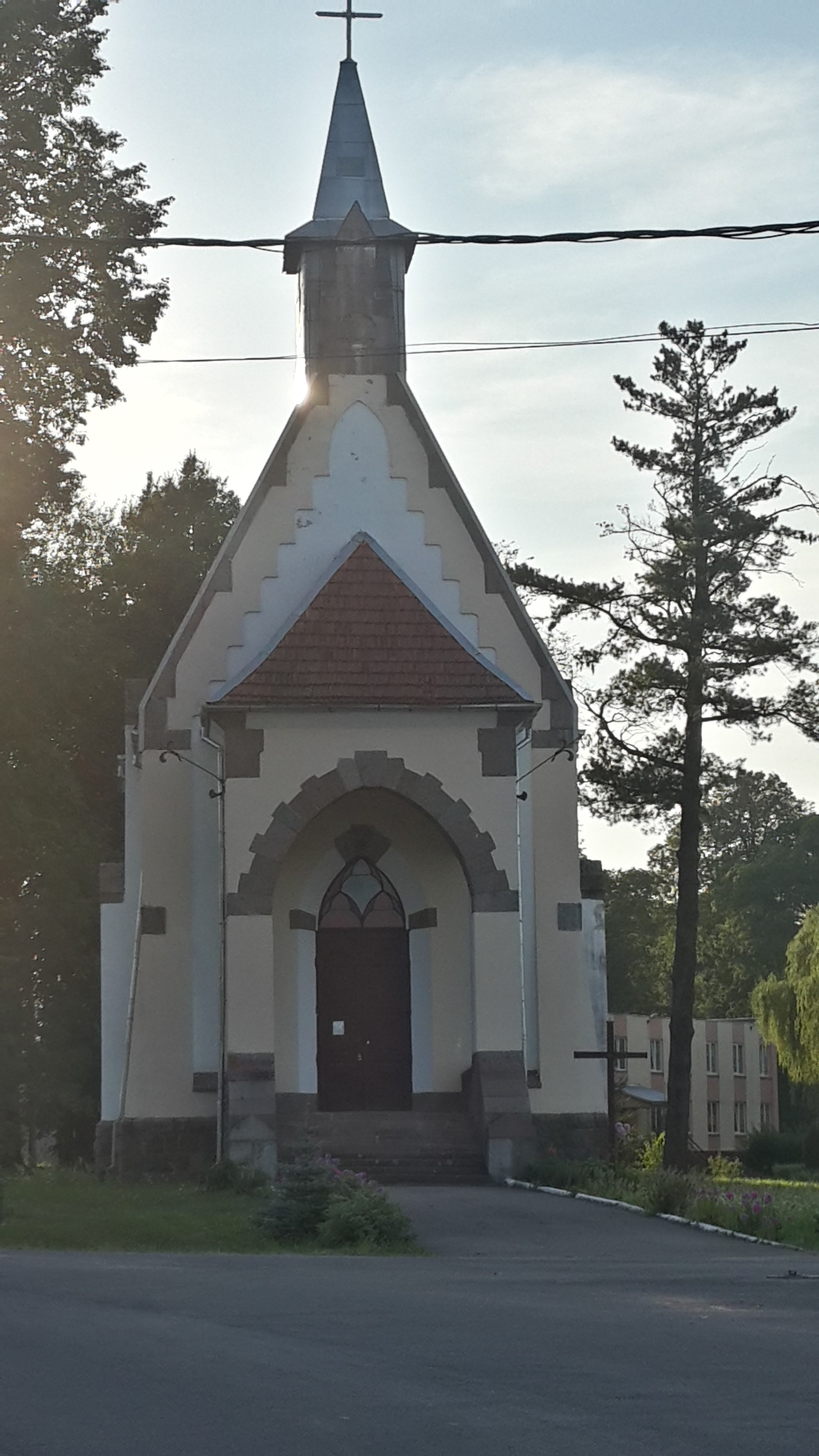 Беларуская (тарашкевіца): Касьцёл, Вязынь